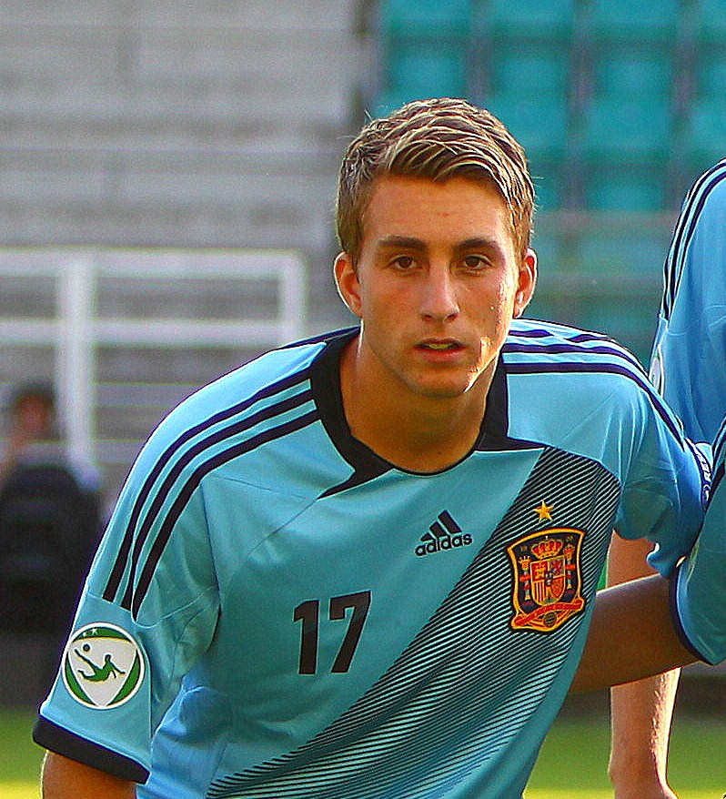 Gerard Deulofeu avec l'équipe d'Espagne de football des moins de 19 ans en 2012.